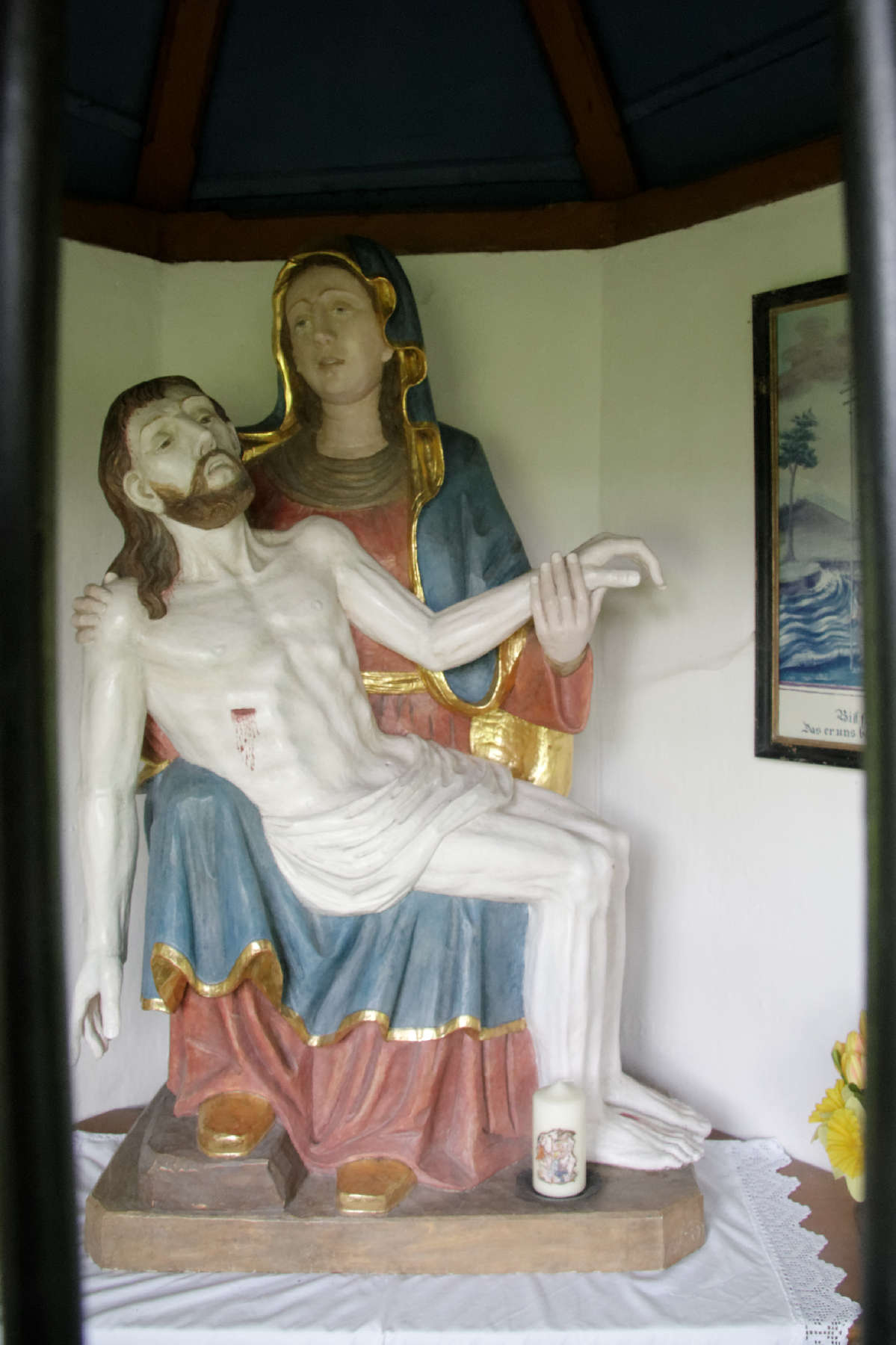 Unterammergau, Inneres der Hoad-Kapelle am Weg entlang der Engen Laine